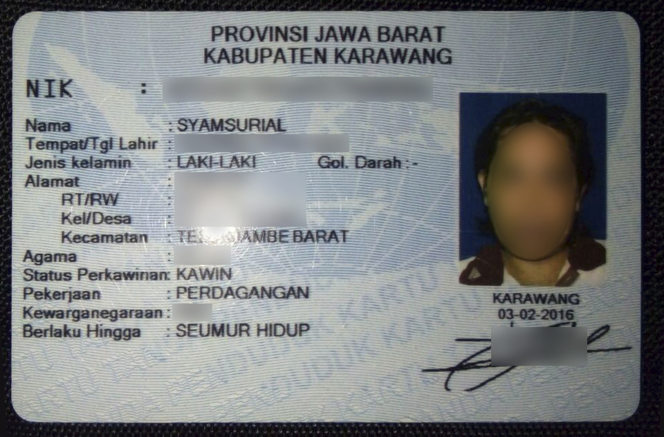 syamsurial